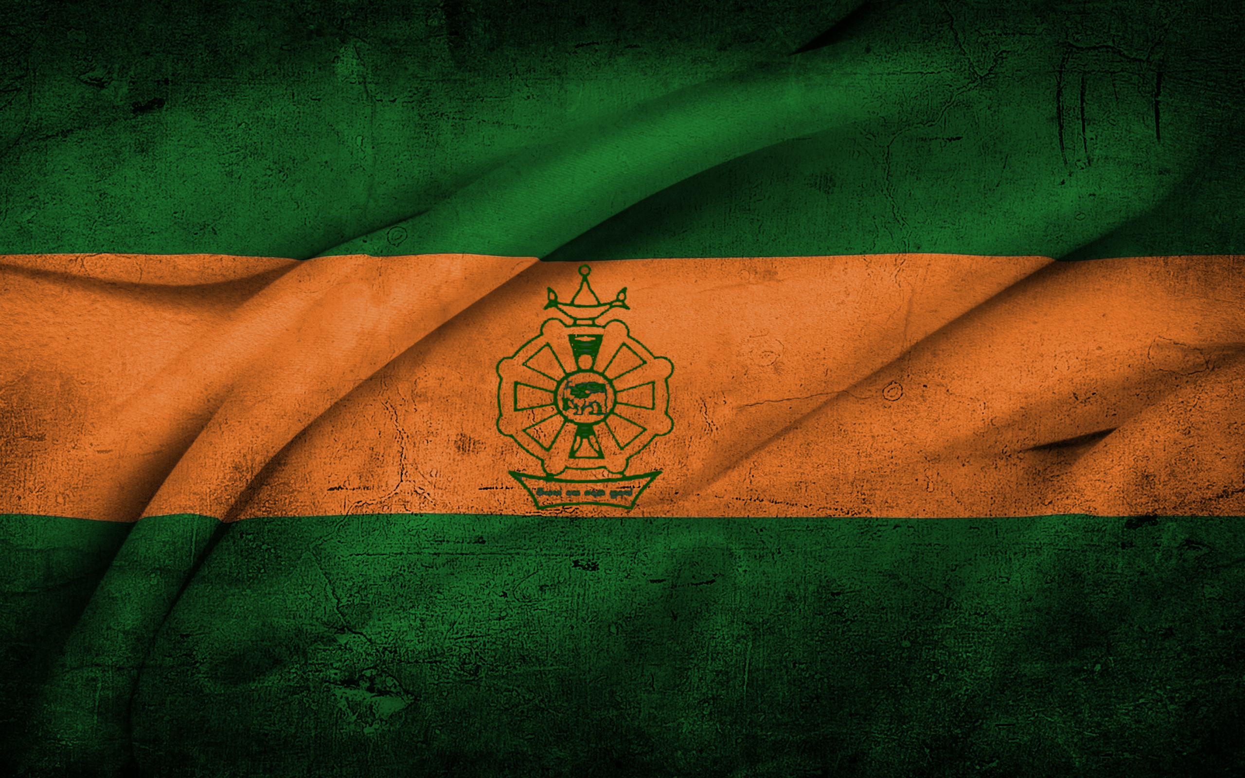 සිංහල: මහරගම ජනාධිපති විද්‍යාලිය ධජය.